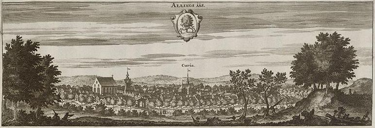 Alingsås in Sweden Engraving made 1690-1710